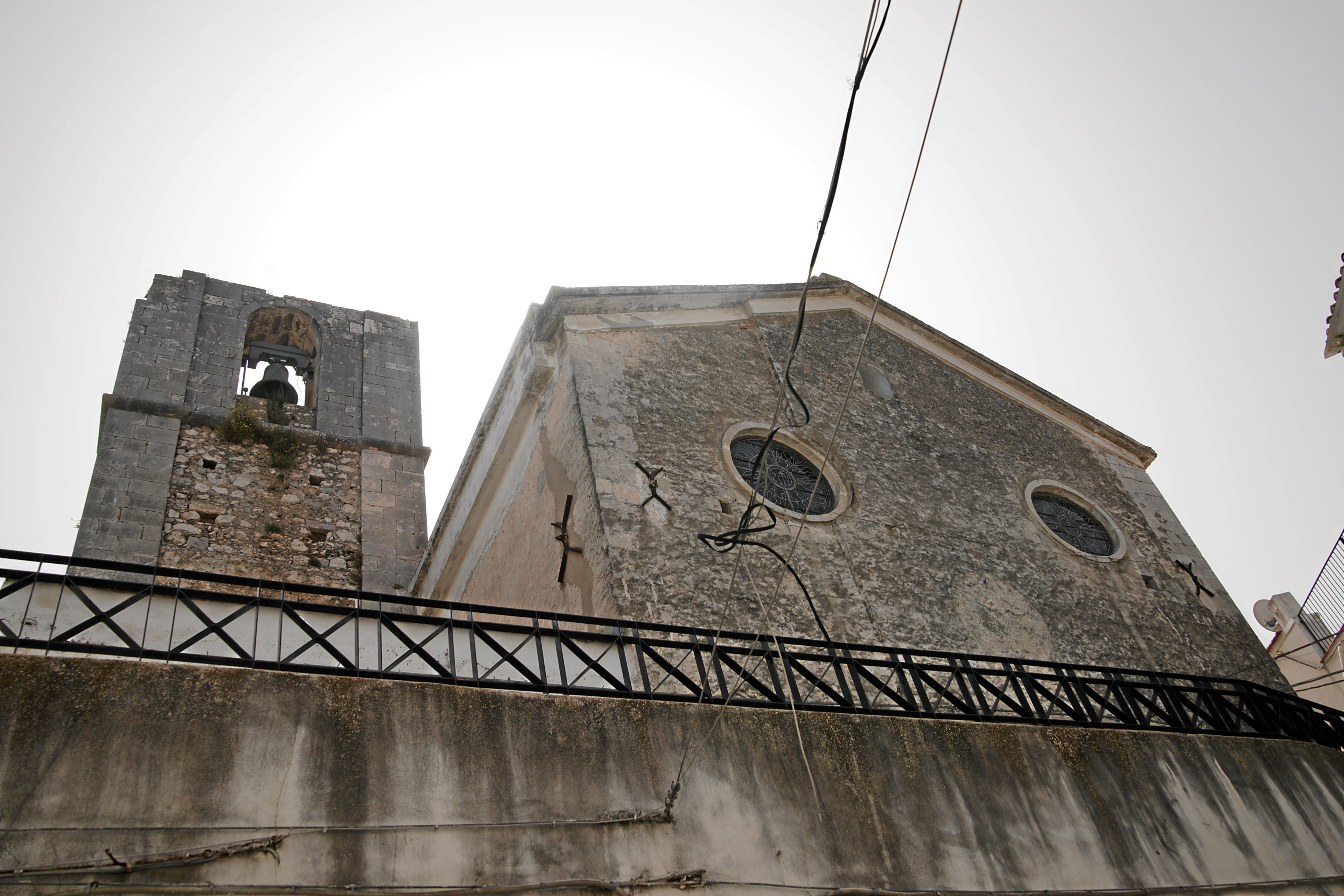 Peschici: Chiesa S. Elia Profeta